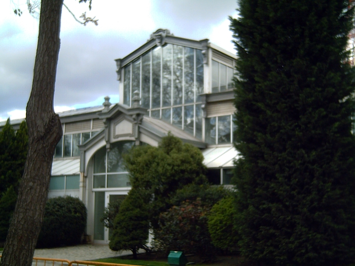 Antiguo matadero de Arganzuela, reconvertido en Invernadero Palacio de Cristal (Arganzuela) Madrid, Spain. A work release by Javier martin gathered Arganzuela up, 24 March, 2006. Donated to Wikipedia.